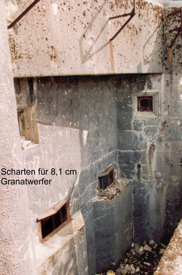 8,1 Granatwerfer-Scharte, Infanteriewerk Coume Sud, Block 3, Maginot-Linie